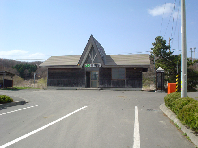 Tomikawa Station in Hidaka Main Line, Japan